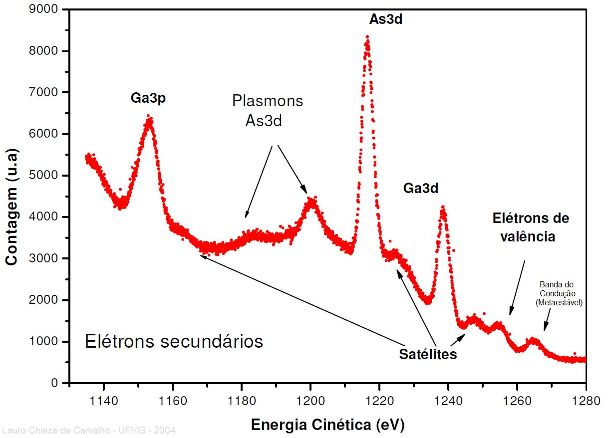 Espectro XPS para GaAs(100)